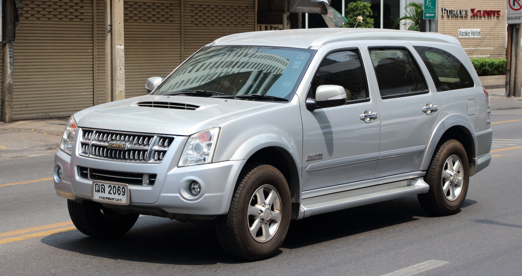 Isuzu MU-7 in Bangkok